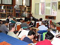 לומדים בבית המדרש